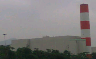 內湖垃圾焚化廠。